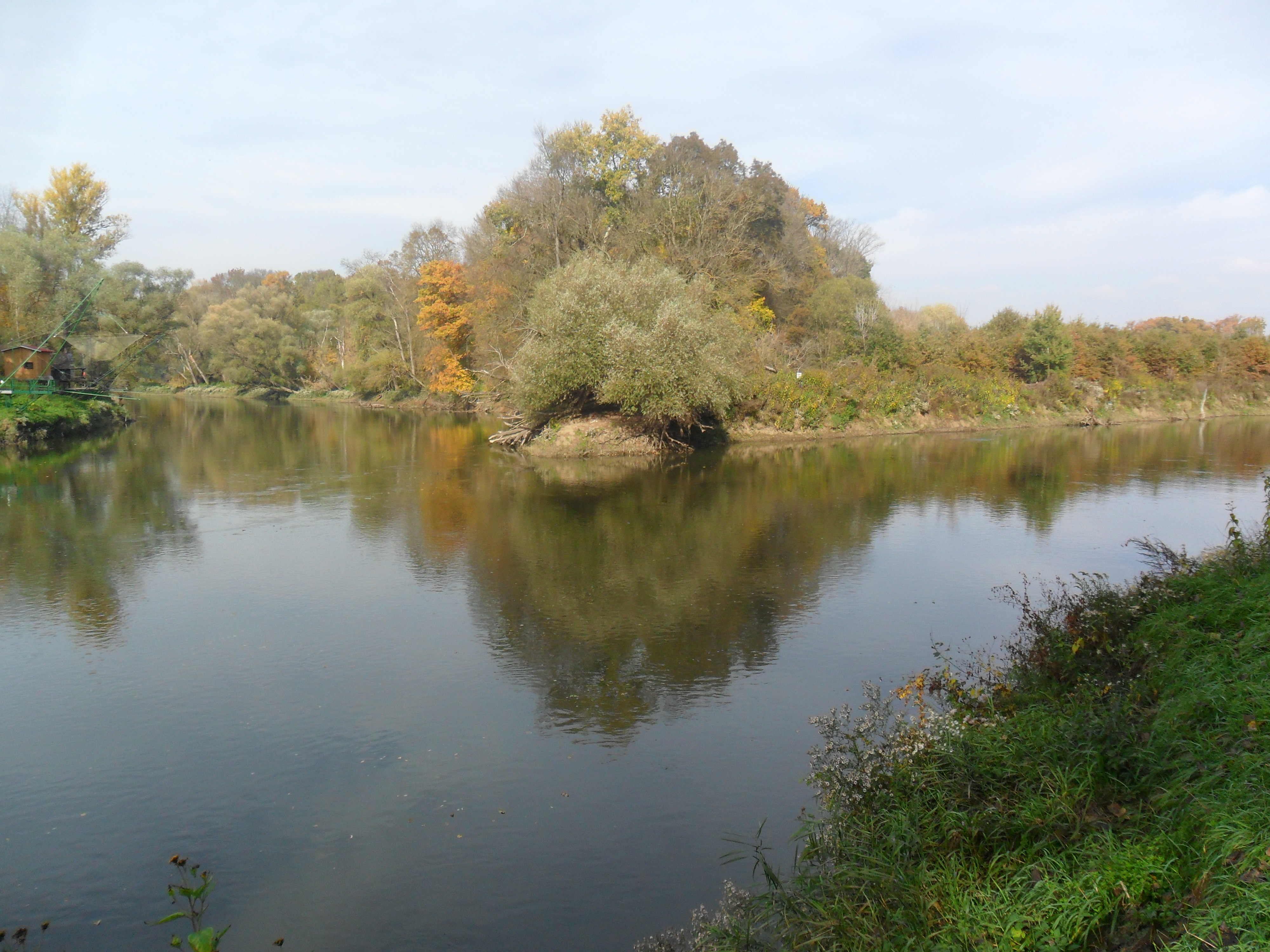 Trojmedzie Rakúsko-Slovensko-Česko